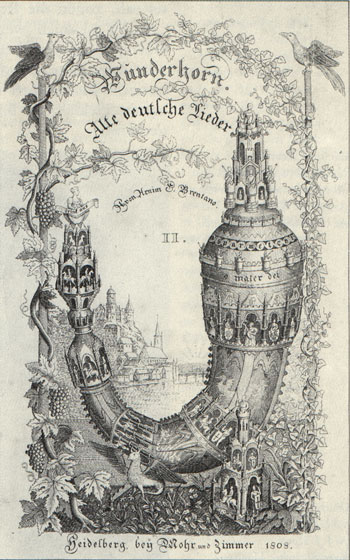 Корица на "Вълшебният рог на момчето" 1806-1808